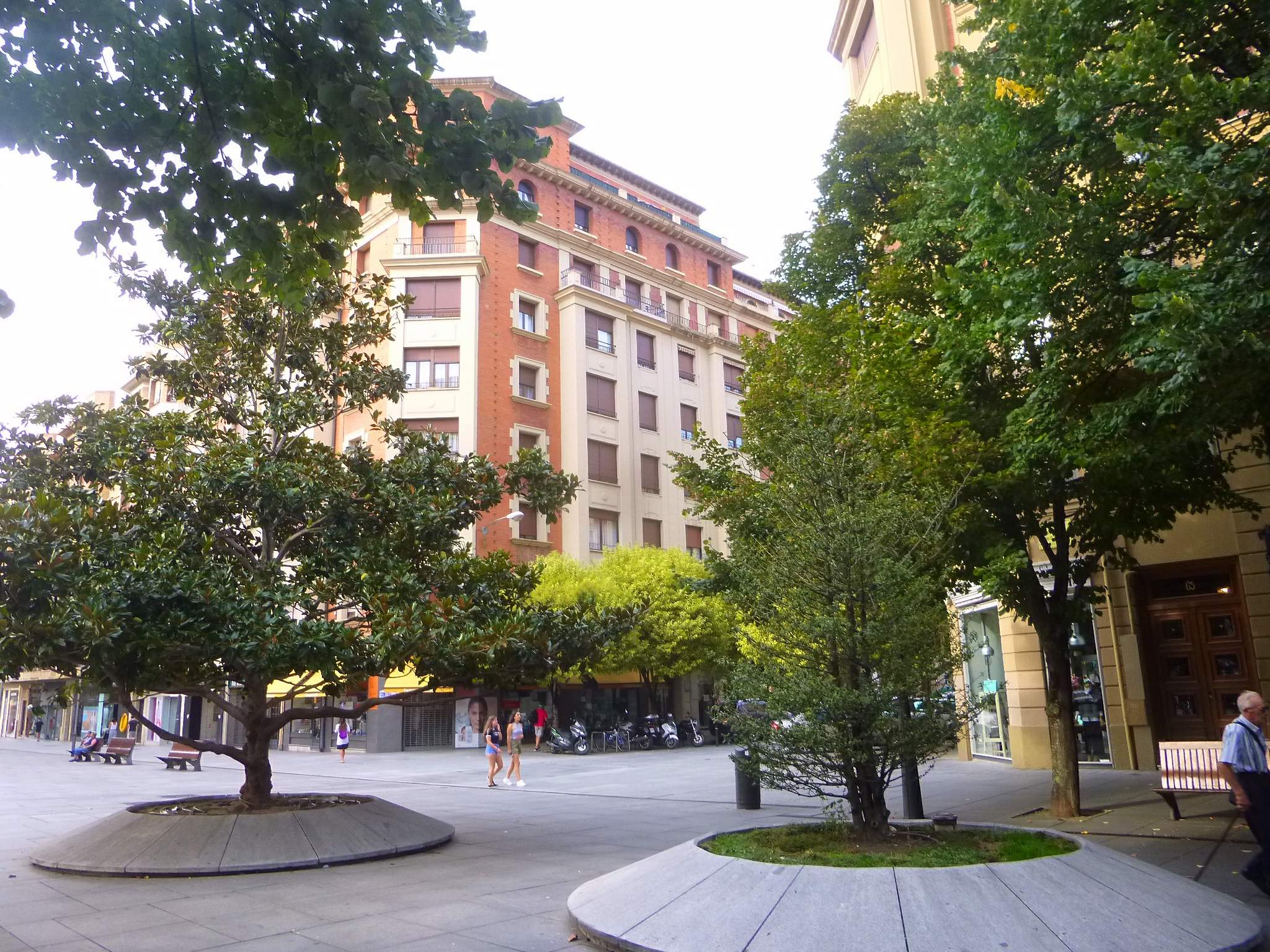 Pamplona - Avenida de Carlos III el Noble